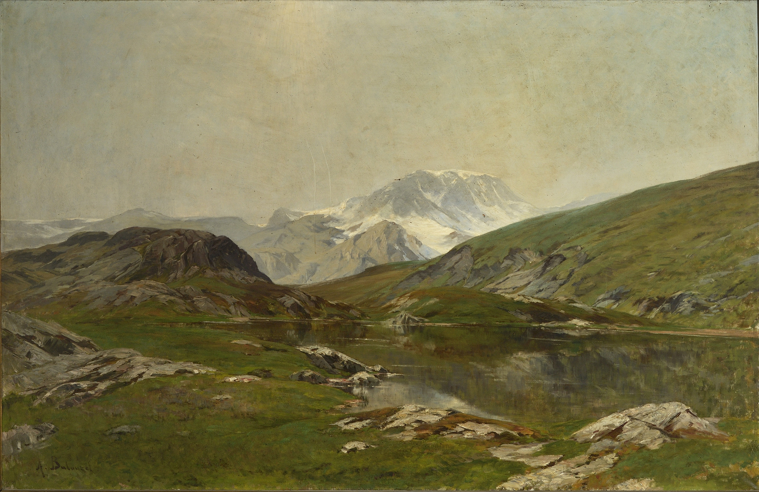 Peinture image sans cadre